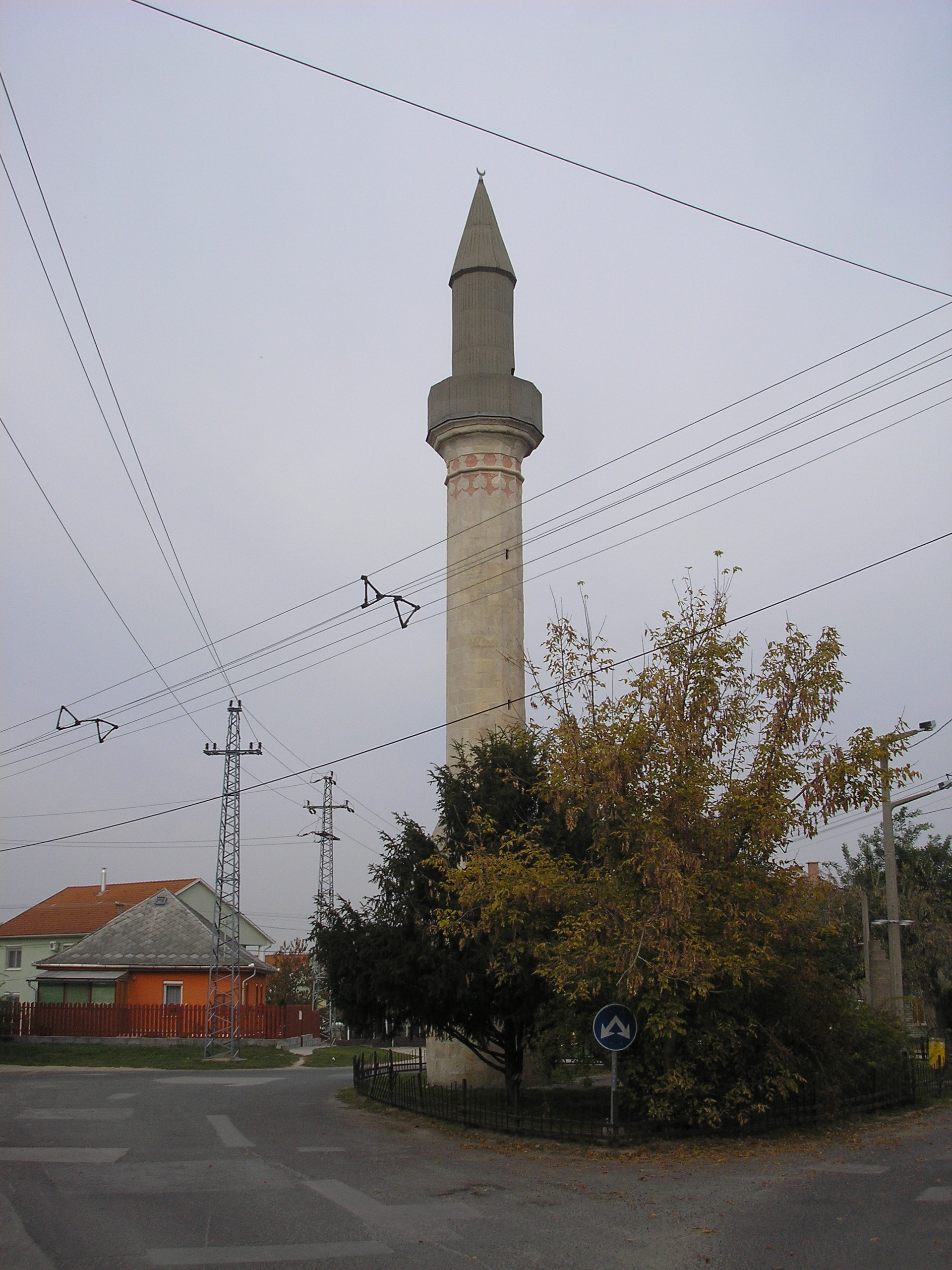 Érd Minarett